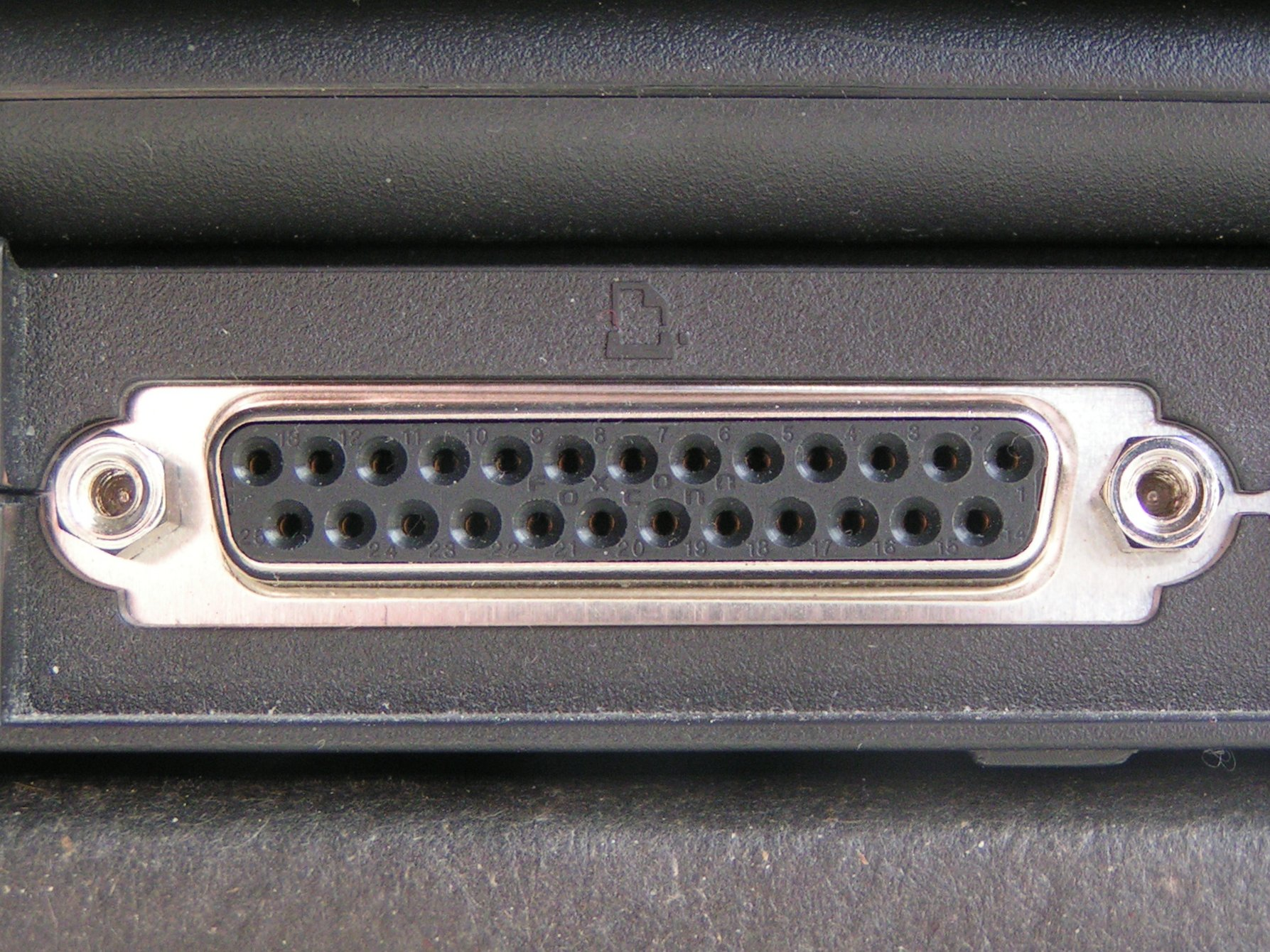 Parallel computer printer port